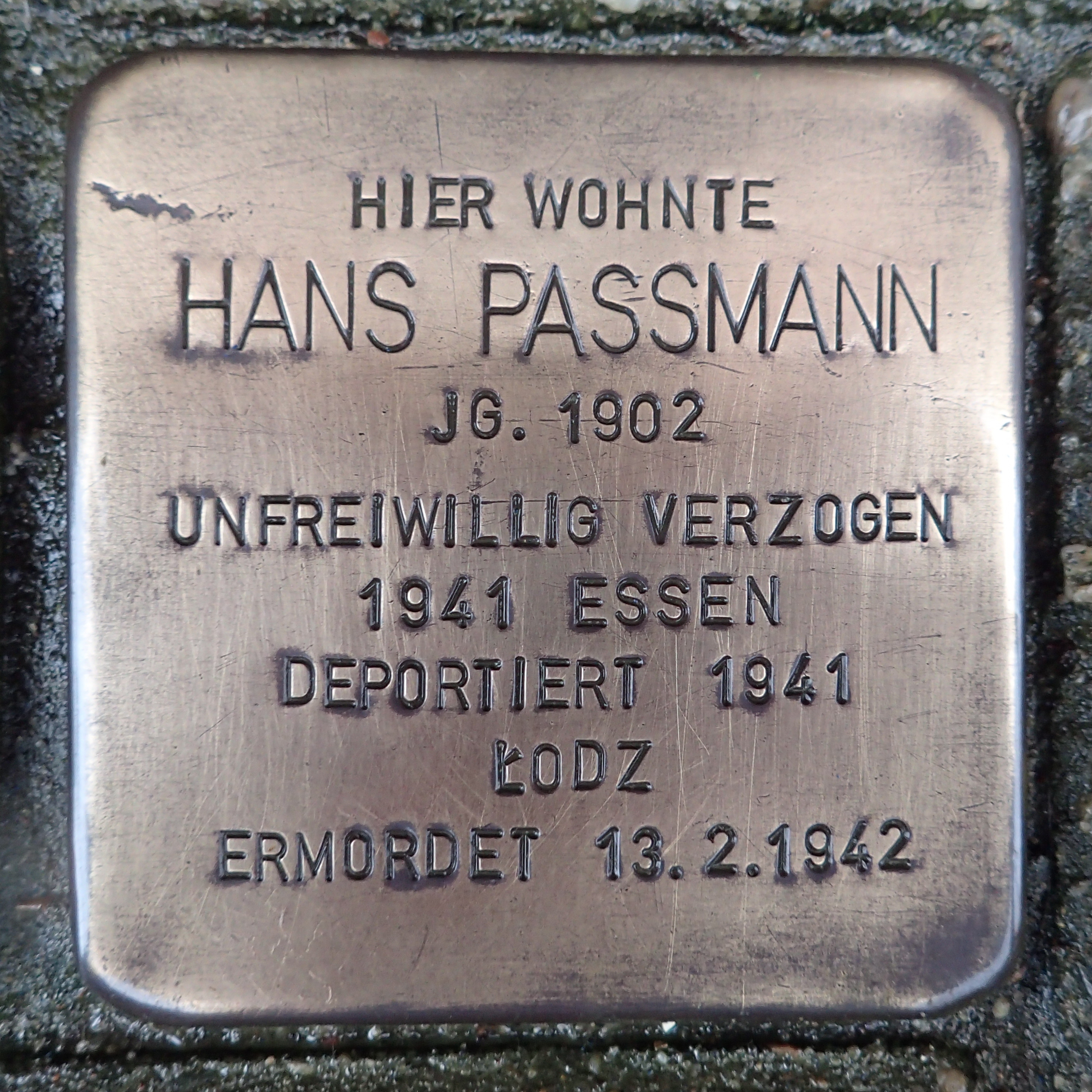 Stolperstein Geldern Westwall 67 Hans Passmann